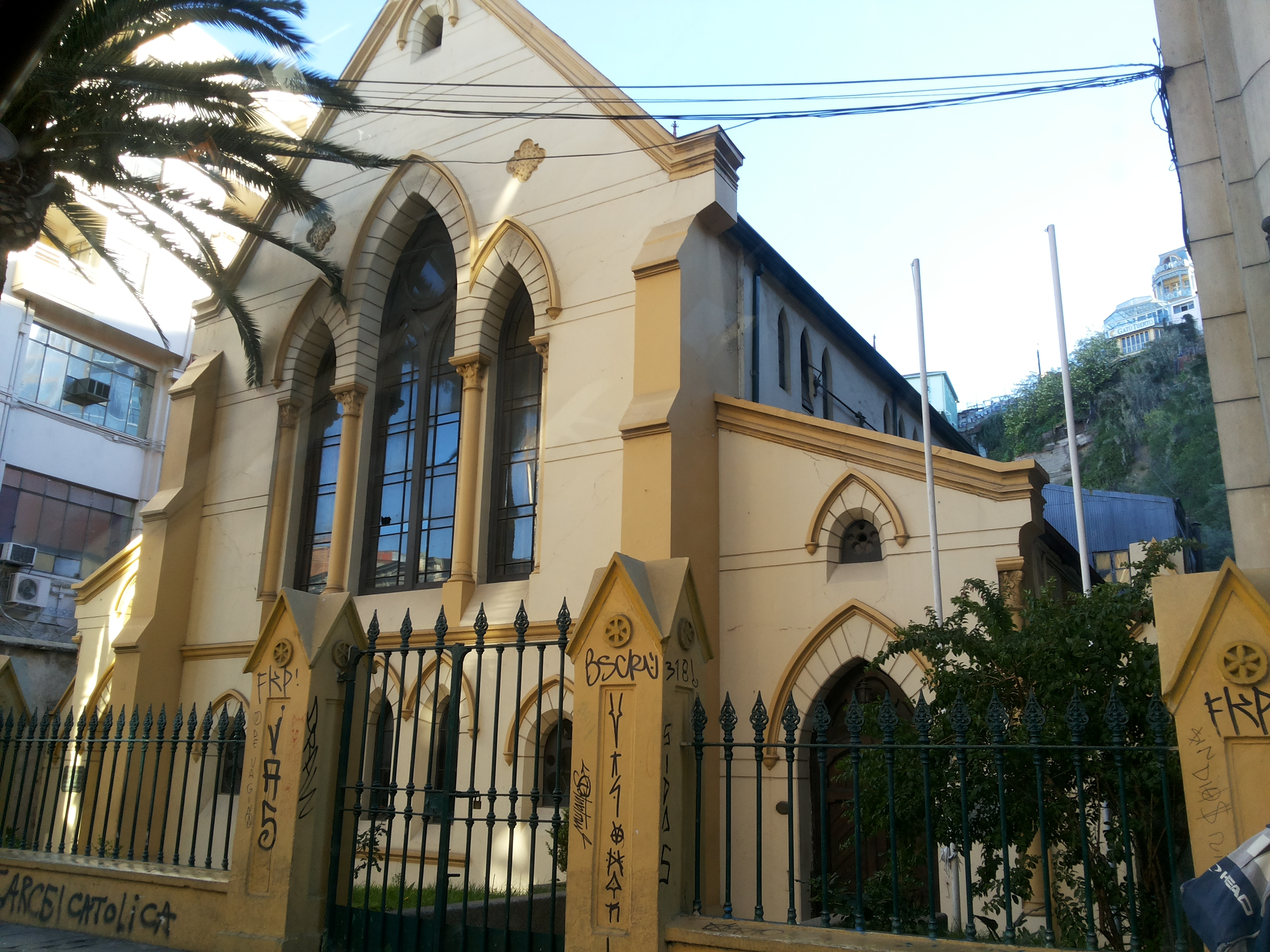 Iglesia presbiteriana de Valparaíso (hasta 1946 el templo perteneció a la Union Church); la edificación fue declarada Monumento Histórico el 20 de mayo de 2003. This is a photo of a national monument in Chile: Unknown